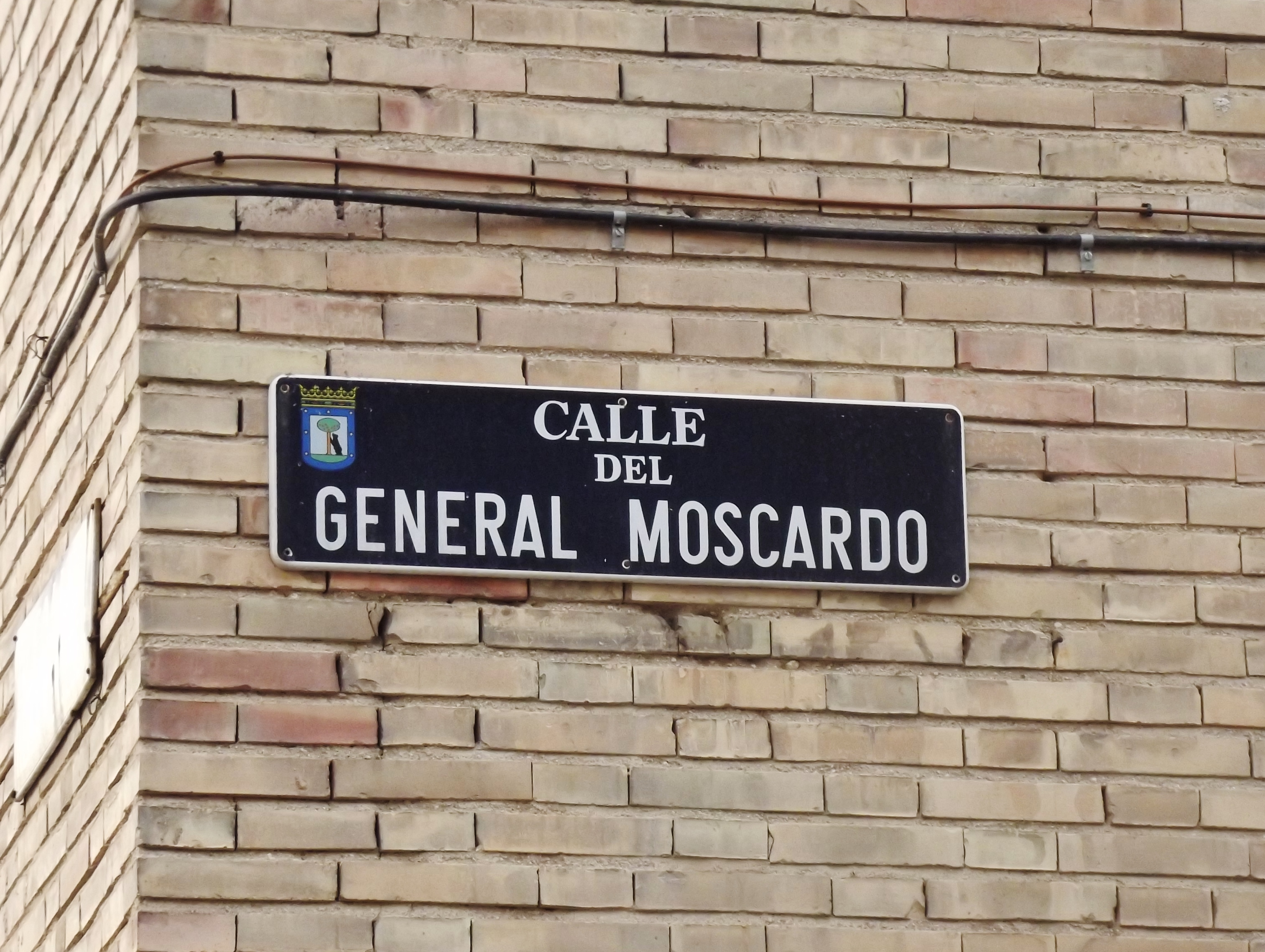 Letrero de la esquina de la calle del General Moscardó con la calle Reina Mercedes